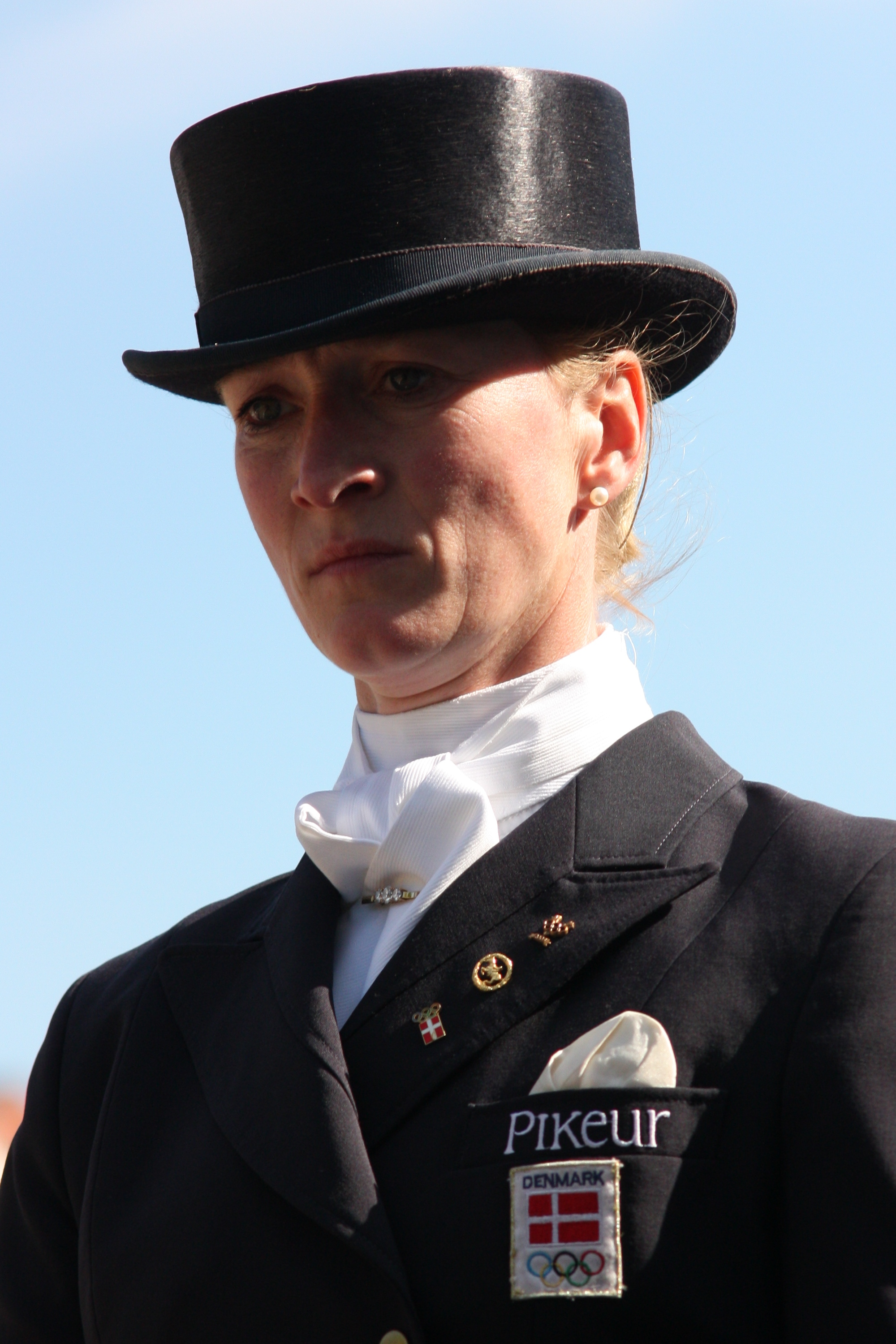 77. Internationales Pfingstturnier Wiesbaden 2013, CDI **** Dressurprüfung Grand Prix de Dressage, Sayn-Wittgenstein,Nathalie zu mit Fabienne Personality rights warningAlthough this work is freely licensed or in the public domain, the person(s) shown may have rights that legally restrict certain re-uses unless those depicted consent to such uses. In these cases, a model release or other evidence of consent could protect you from infringement claims.